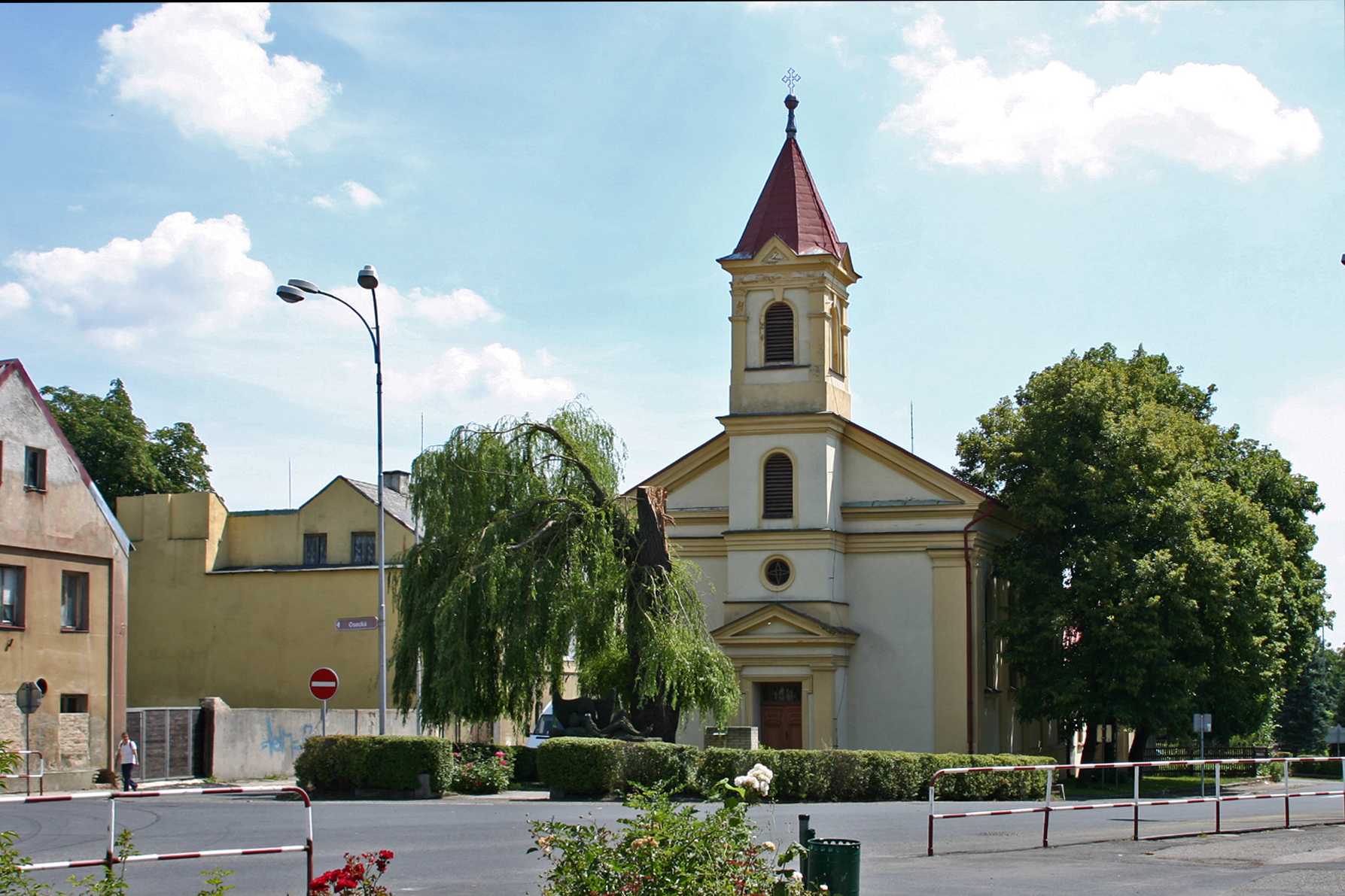 Město Lom v okrese Most - náměstí a kostel.